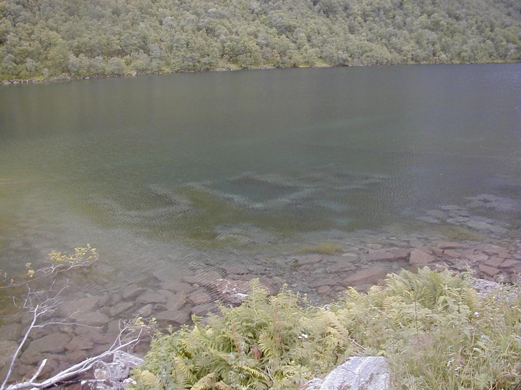 Bilde av Lyngstøylvatnet. Ruinene som ligger under vann er restene etter en gård som lå der før vannet ble demmet opp. Fotograf: Johnny Ljunggren